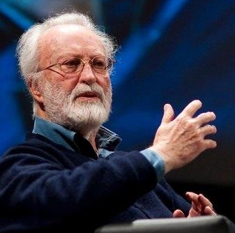 Eugenio Scalfari al Festival Internazionale del Giornalismo di Perugia.